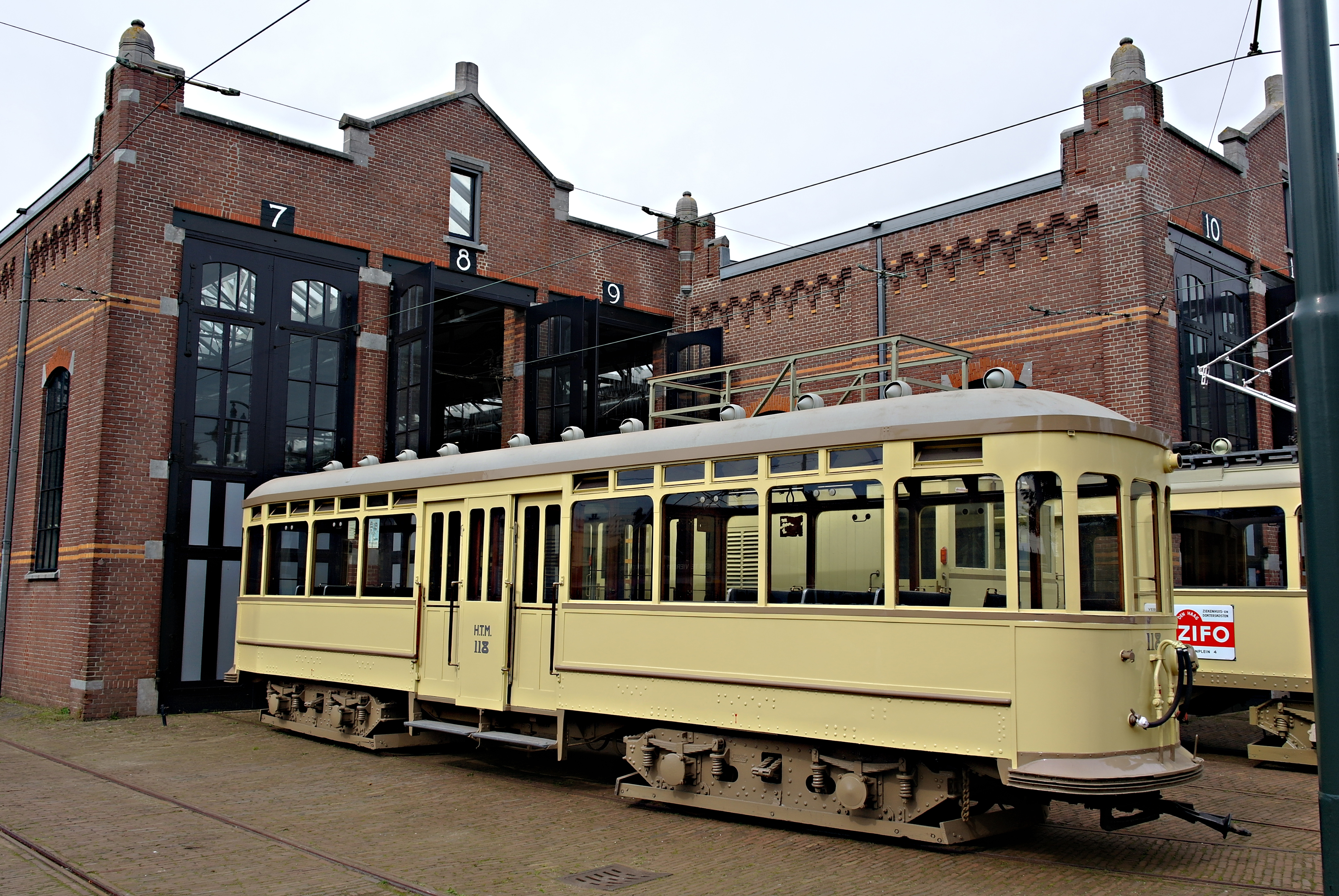 'Salonwagen' uit het museumbestand van het HOVM